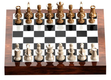 تصميم شطرنج بواسطة برنامج رسم هندسي